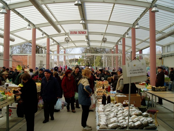 Zelena tržnica